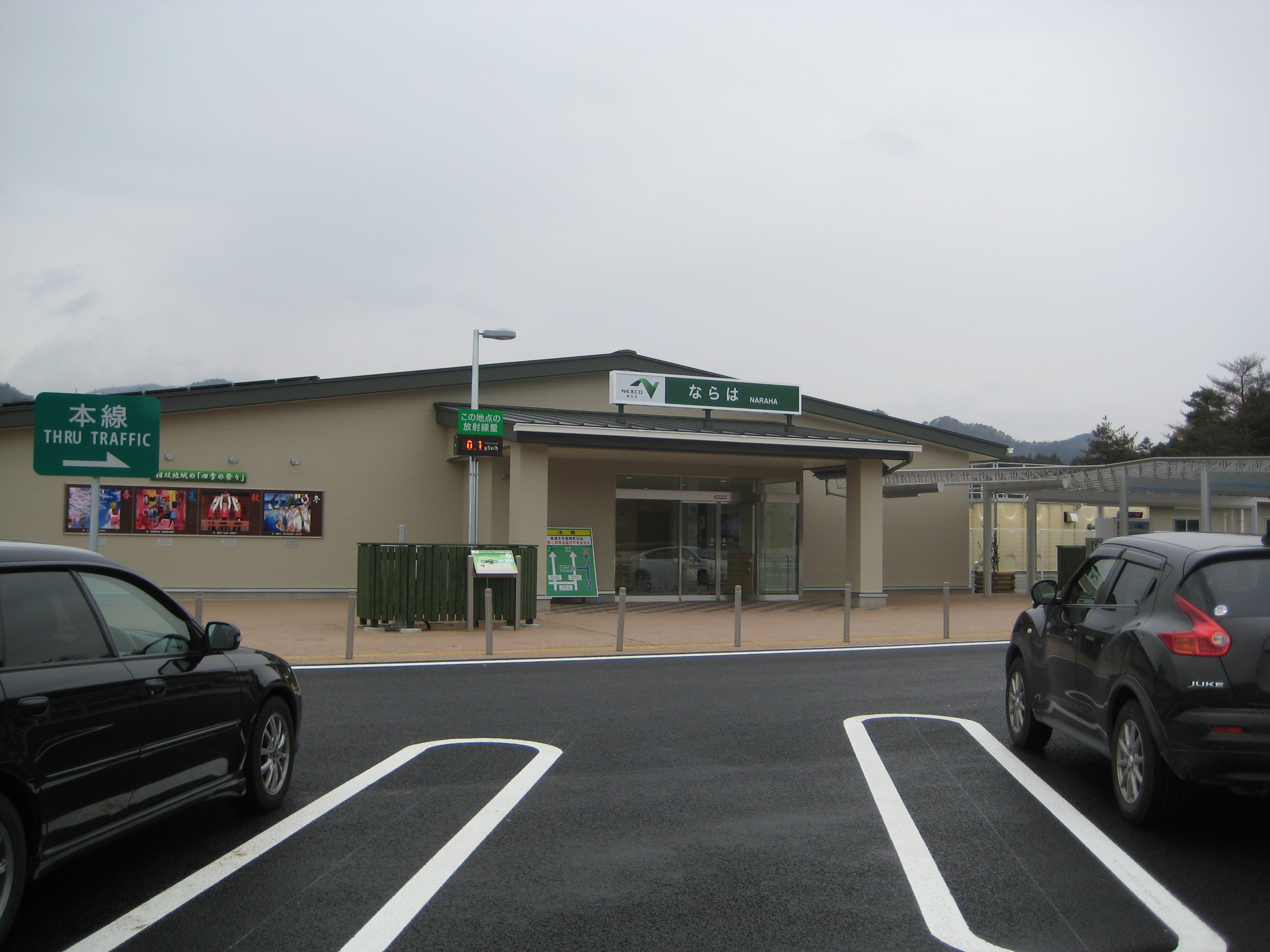 ならはパーキングエリア下り線(2015年3月7日撮影)